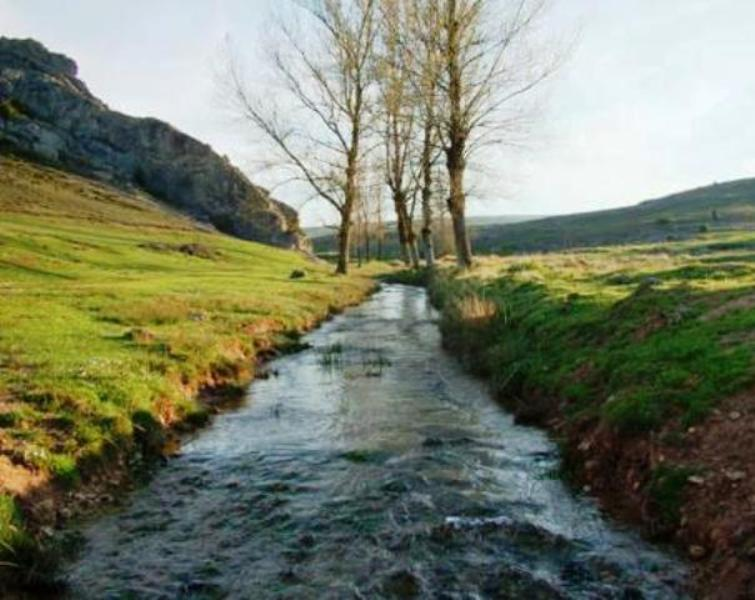 Los primeros cien metros de su nacimiento.